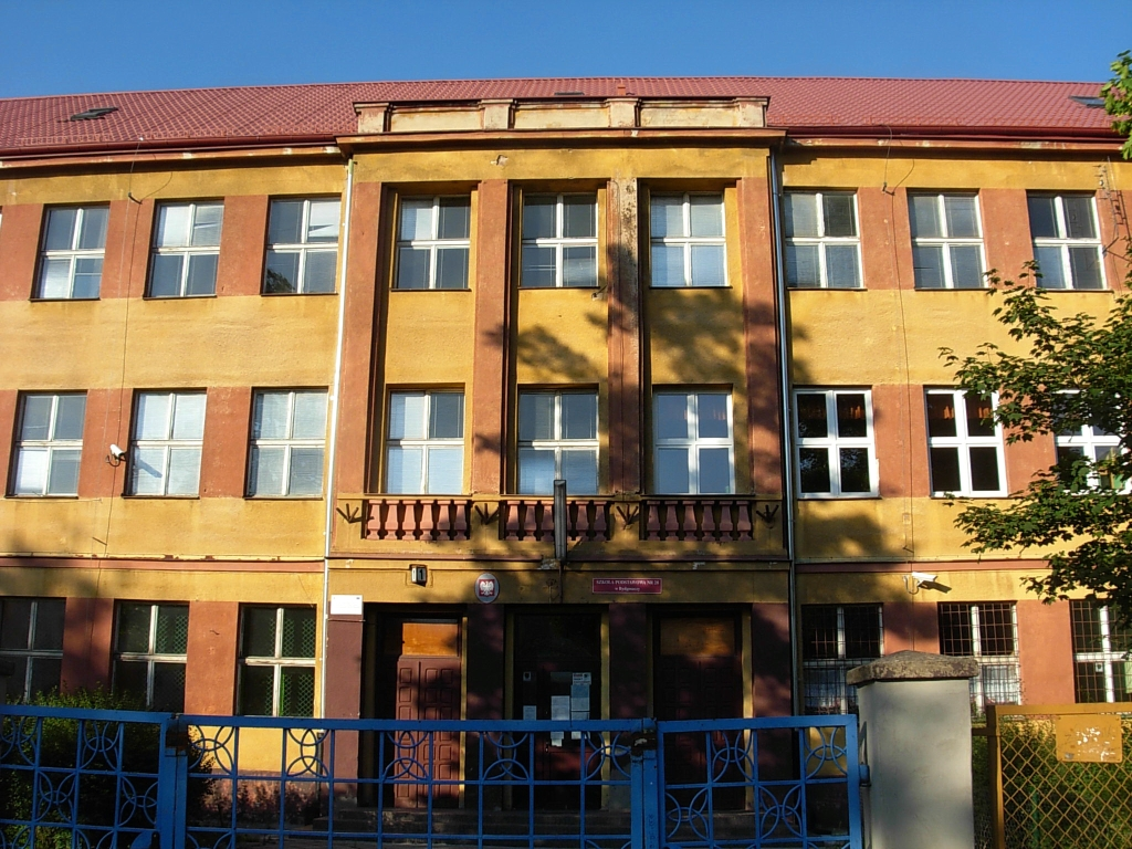 Szkoła Podstawowa nr 28 na Kapuściskach w Bydgoszczy